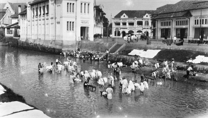 Repronegatief. Wasbazen en wasvrouwen aan het werk in het Ciliwong kanaal (kali) bij Pasar Baru langs de Postweg.